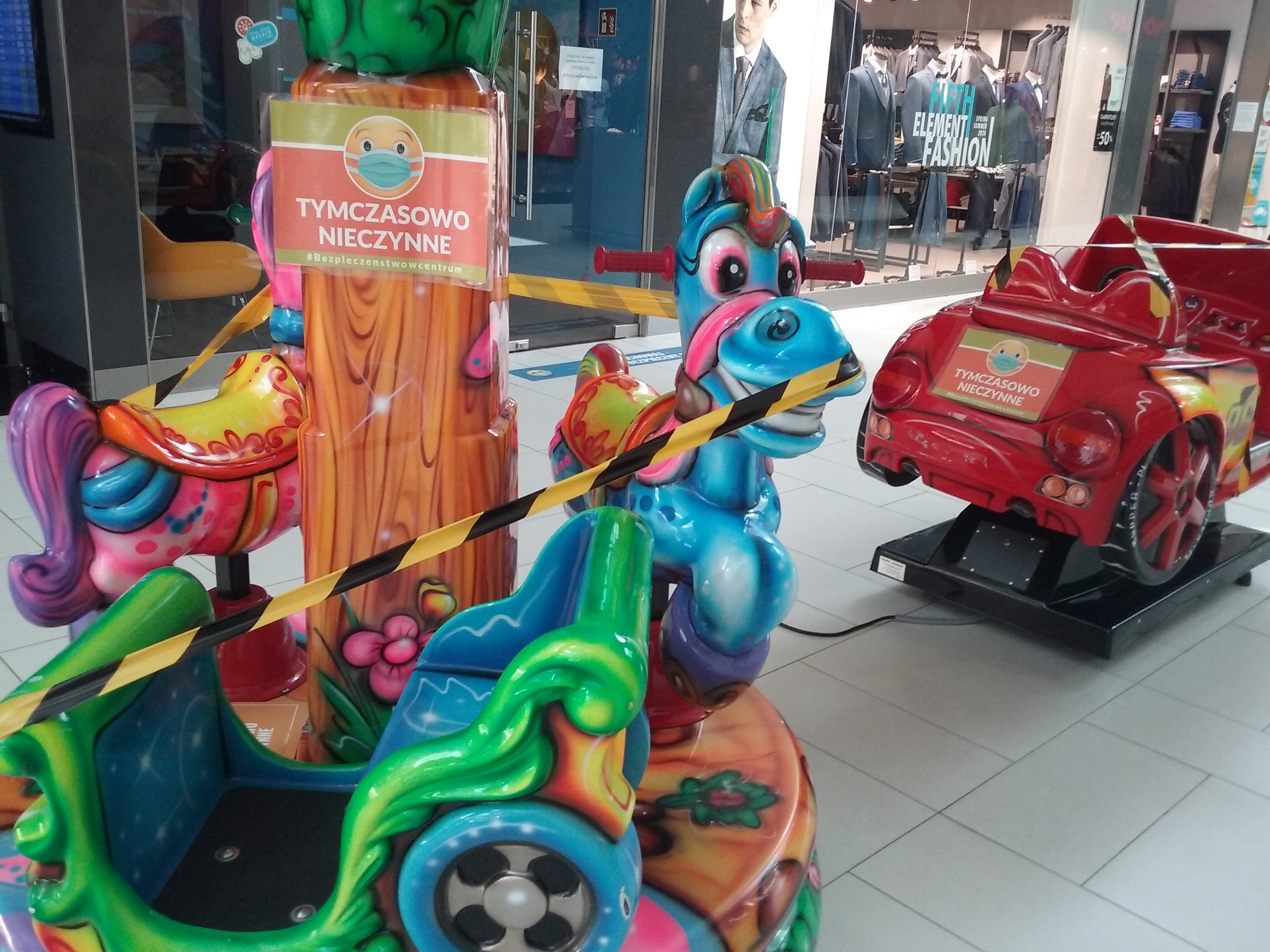 Karuzela na monety zamknięta podczas pandemii SARS-CoV-2. Galeria Handlowa „Tomaszów” w Tomaszowie Mazowieckim, czerwiec 2020